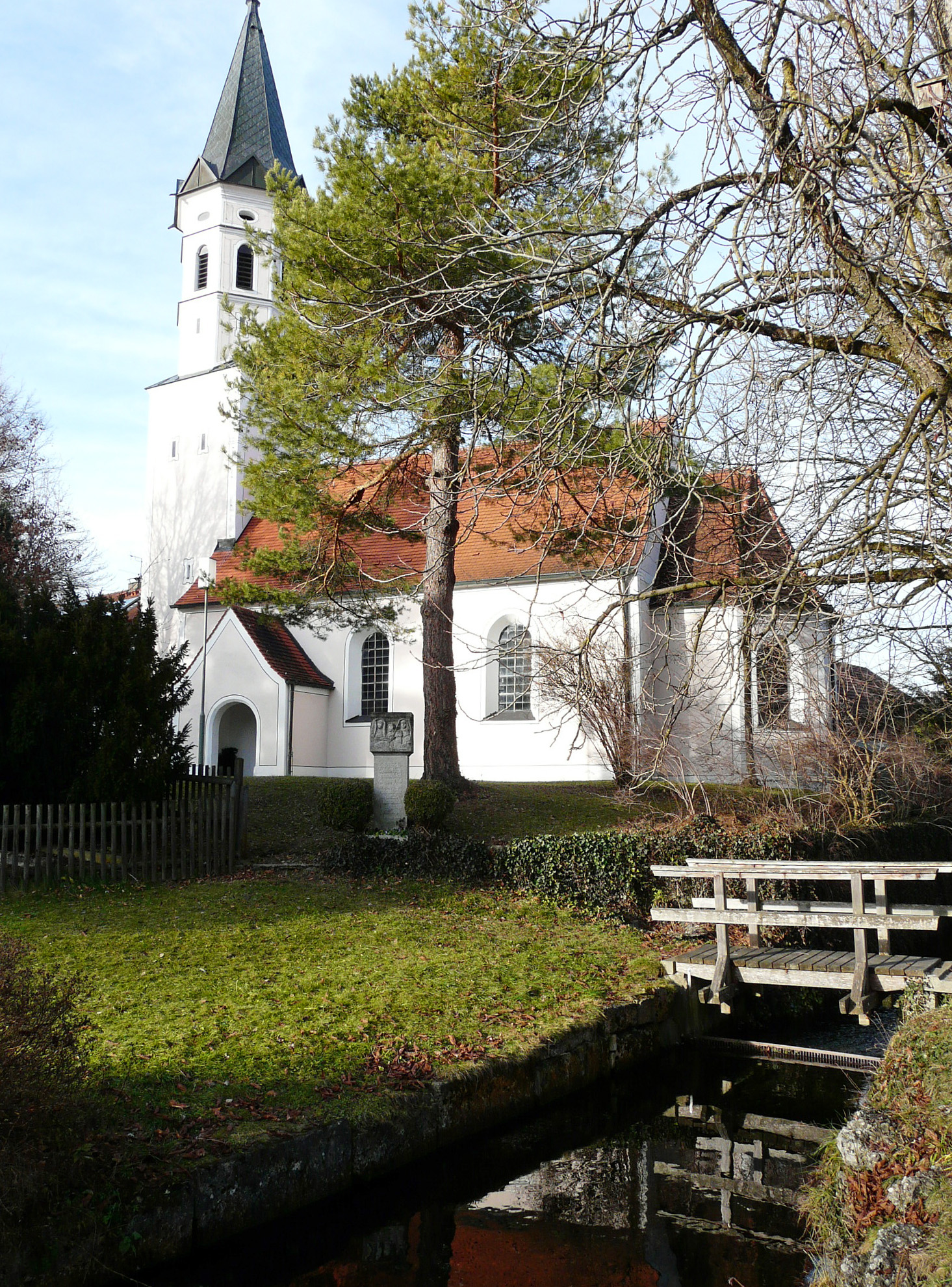 Kirche St. Nikolaus in Waal